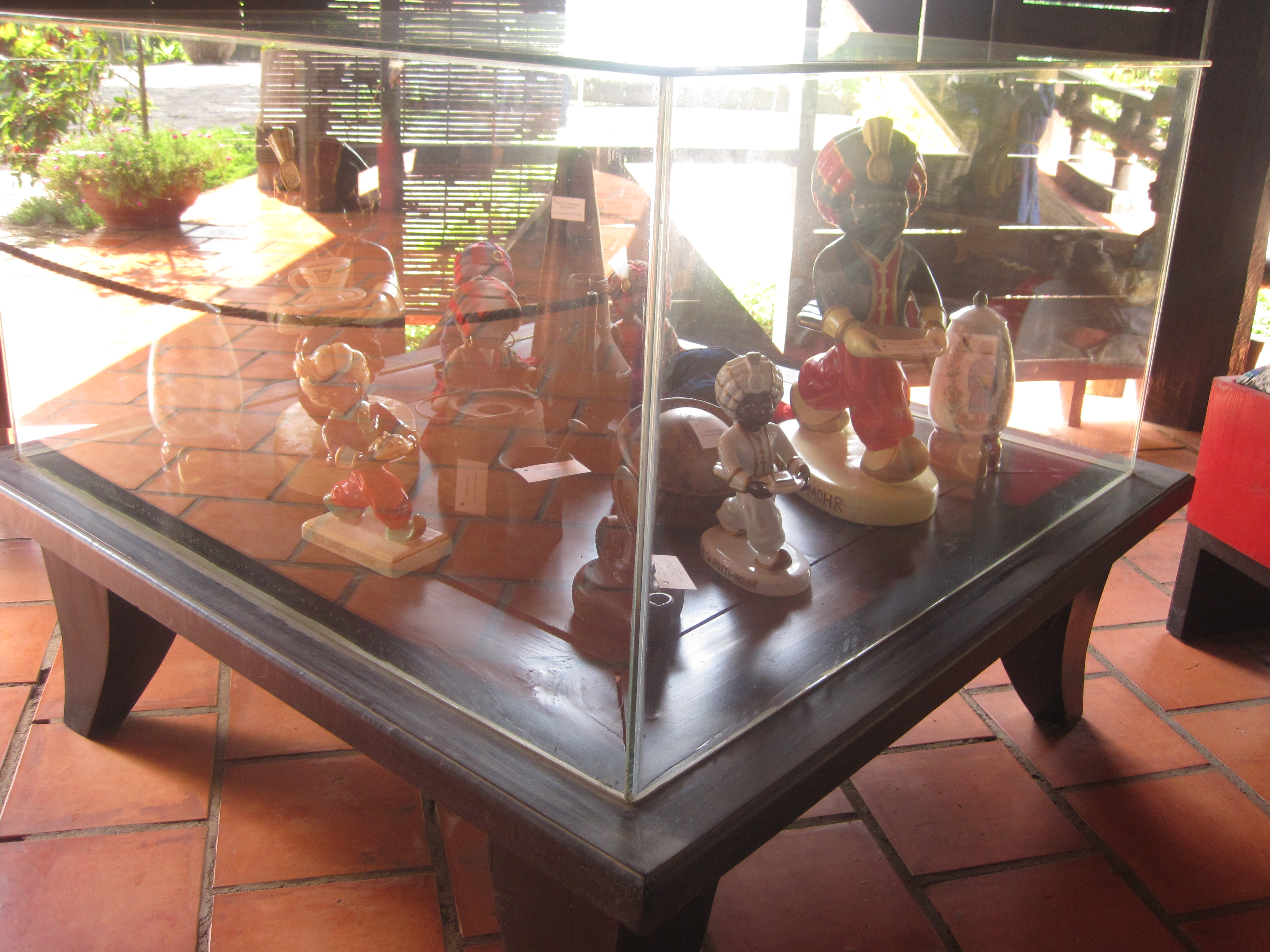 Bao tang ca phe